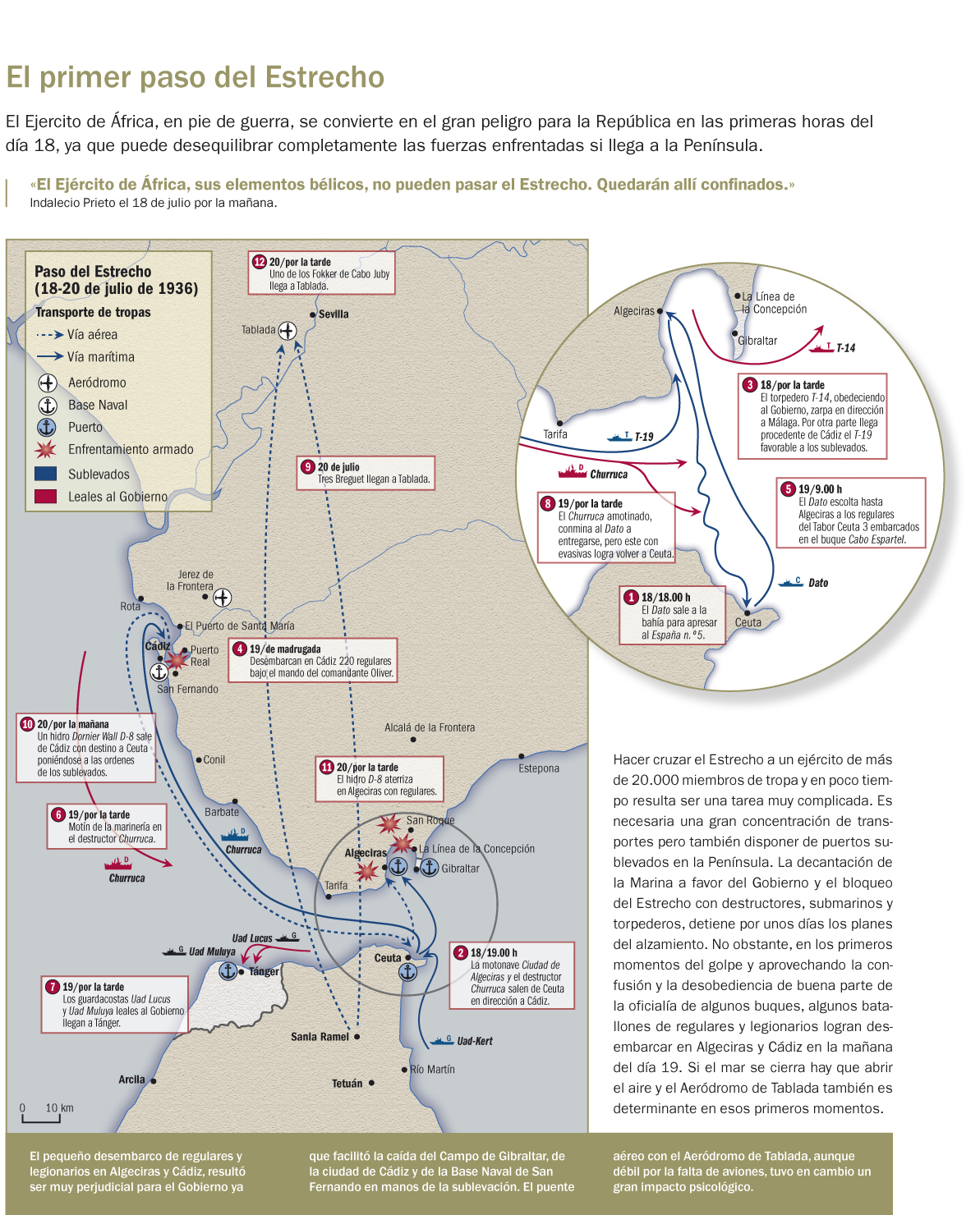 Infografía que narra el cruce del estrecho de Gibraltar por algunas unidades del Ejército de África entre el 18 y el 20 de julio de 1936. Página 33 del libro "La sublevación", de Víctor Hurtado (DAU, 2011).